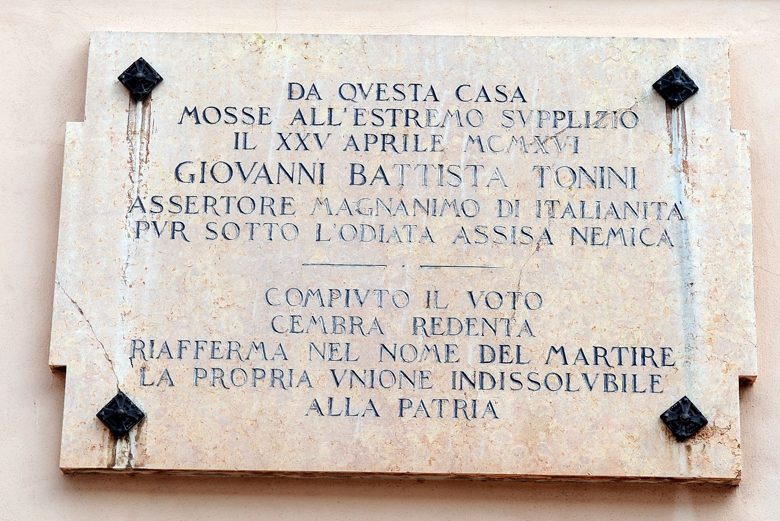 Targa a Giovanni Battisti Tonini a Cembra.